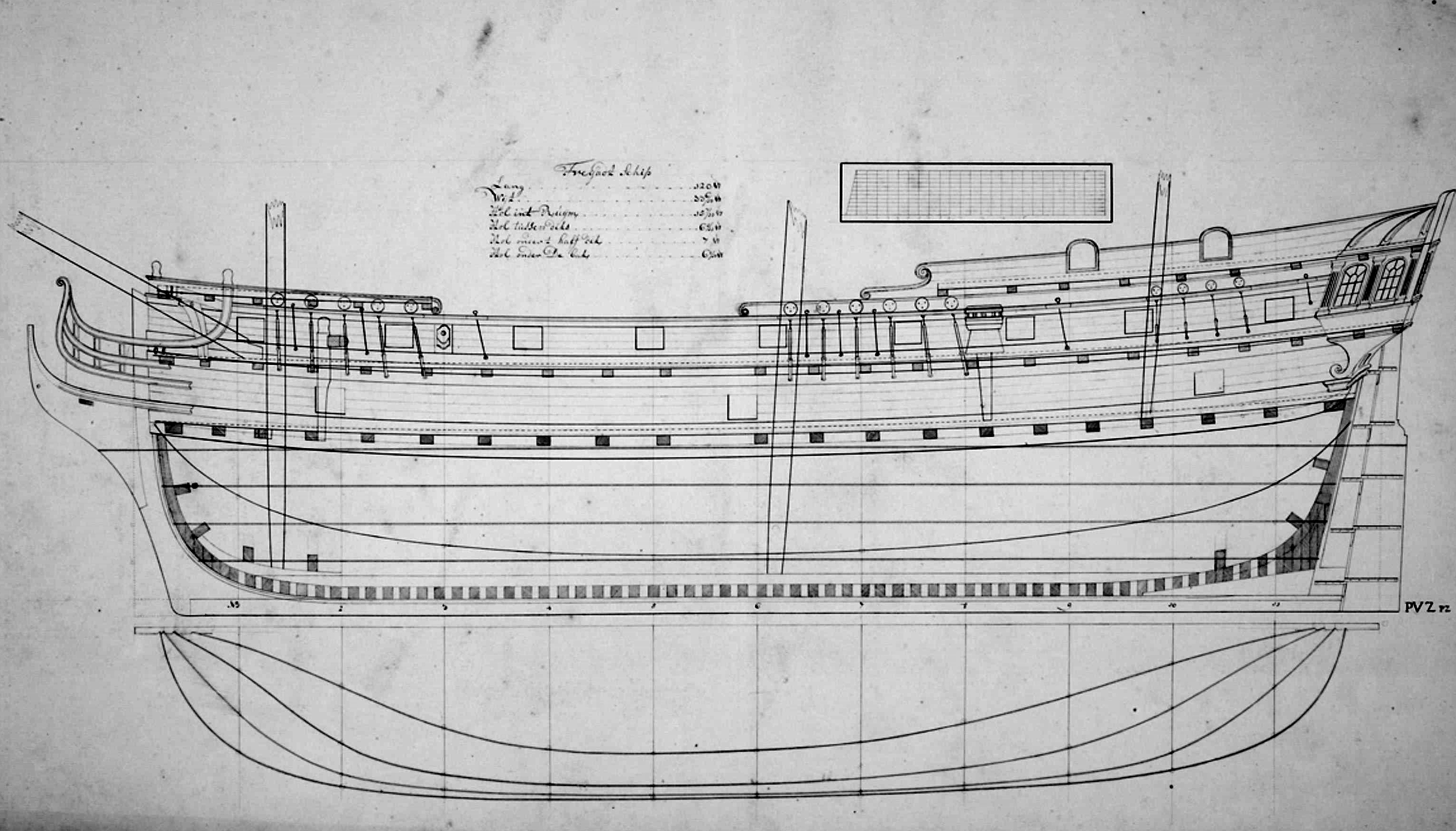 technische Zeichnung eines Fregatschiffes von 120 voet Länge von Paulus van Zwijndregt; ca 1740